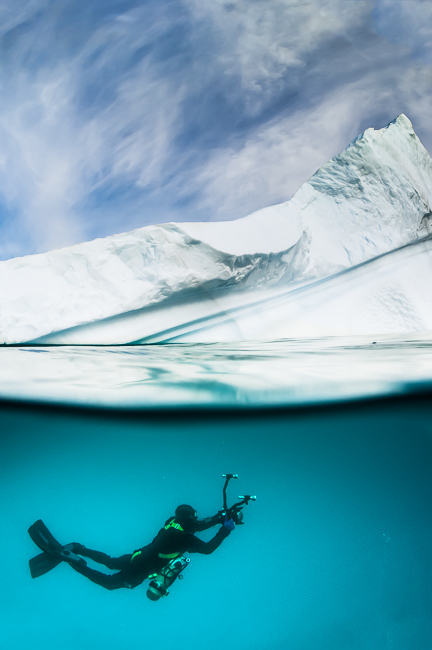 Alban Michon en plongée sous glace au Groenland pendant l'expédition Wide - Greenland Project